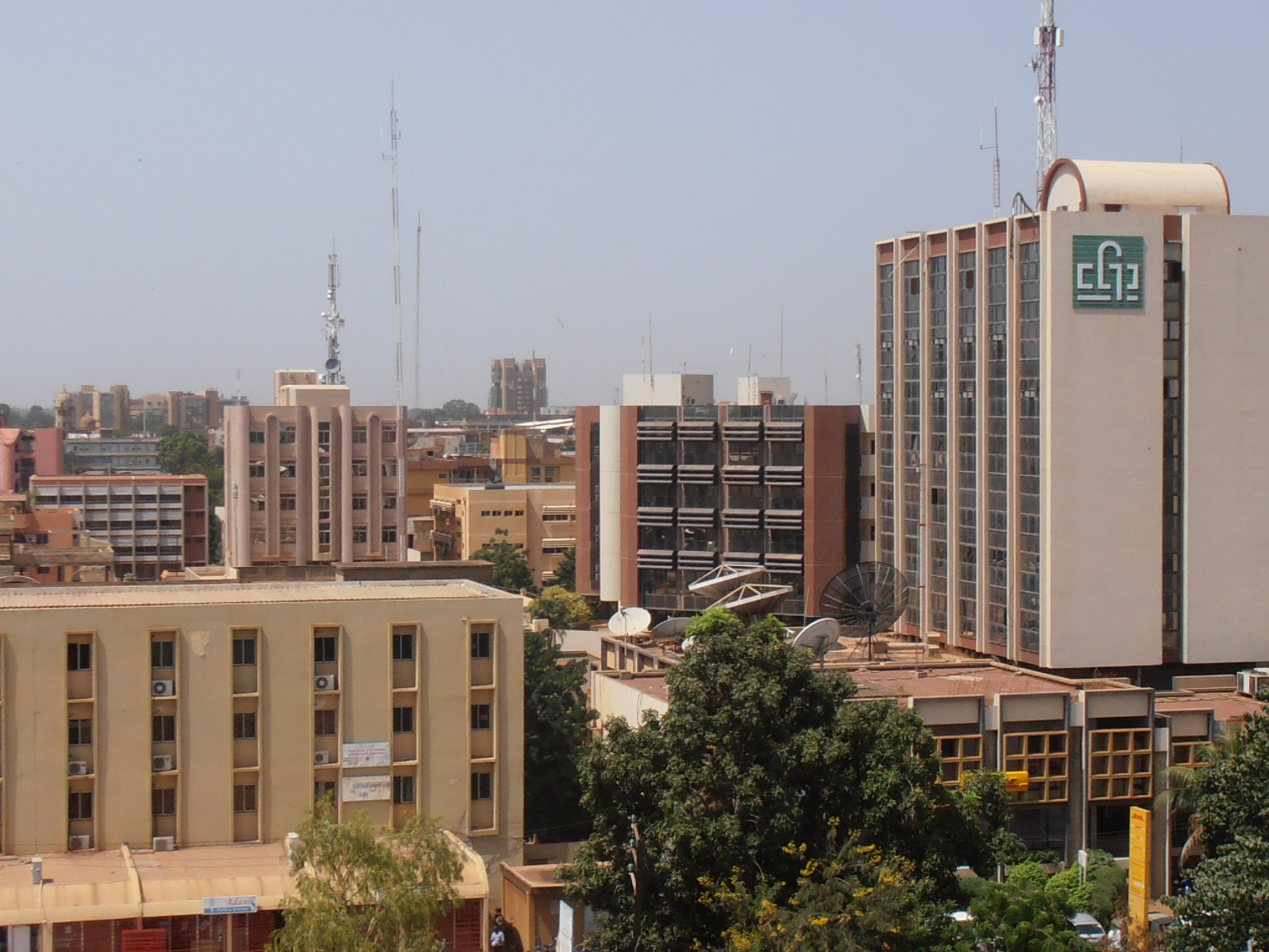 Ouagadougou capitale du BURKINA FASO